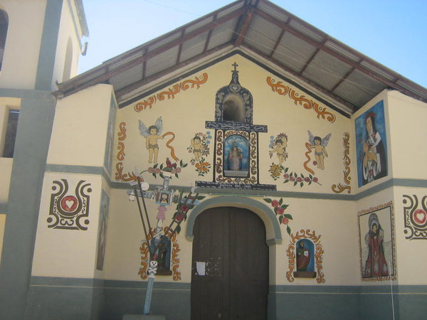 Iglesia de Quinocay, Yauyos, Lima, Perú.